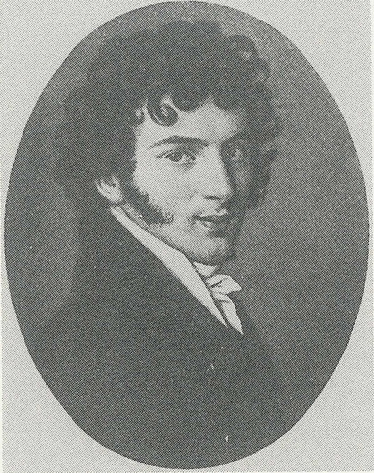 Friedrich Schulz (1795-1864), Braunschweigischer Staatsminister (1843-1848), Präsident des Konsistoriums der Braunschweigischen Landeskirche, Präsident der herzoglichen Kammer, „Exzellenz“ Friedrich Schulz (1795-1864), Minister of State of the Duchy of Brunswick (1843-1848), president of the administration of the Brunswick State Church, president of the „Ducal Chamber“, awarded with the title „Excellence“